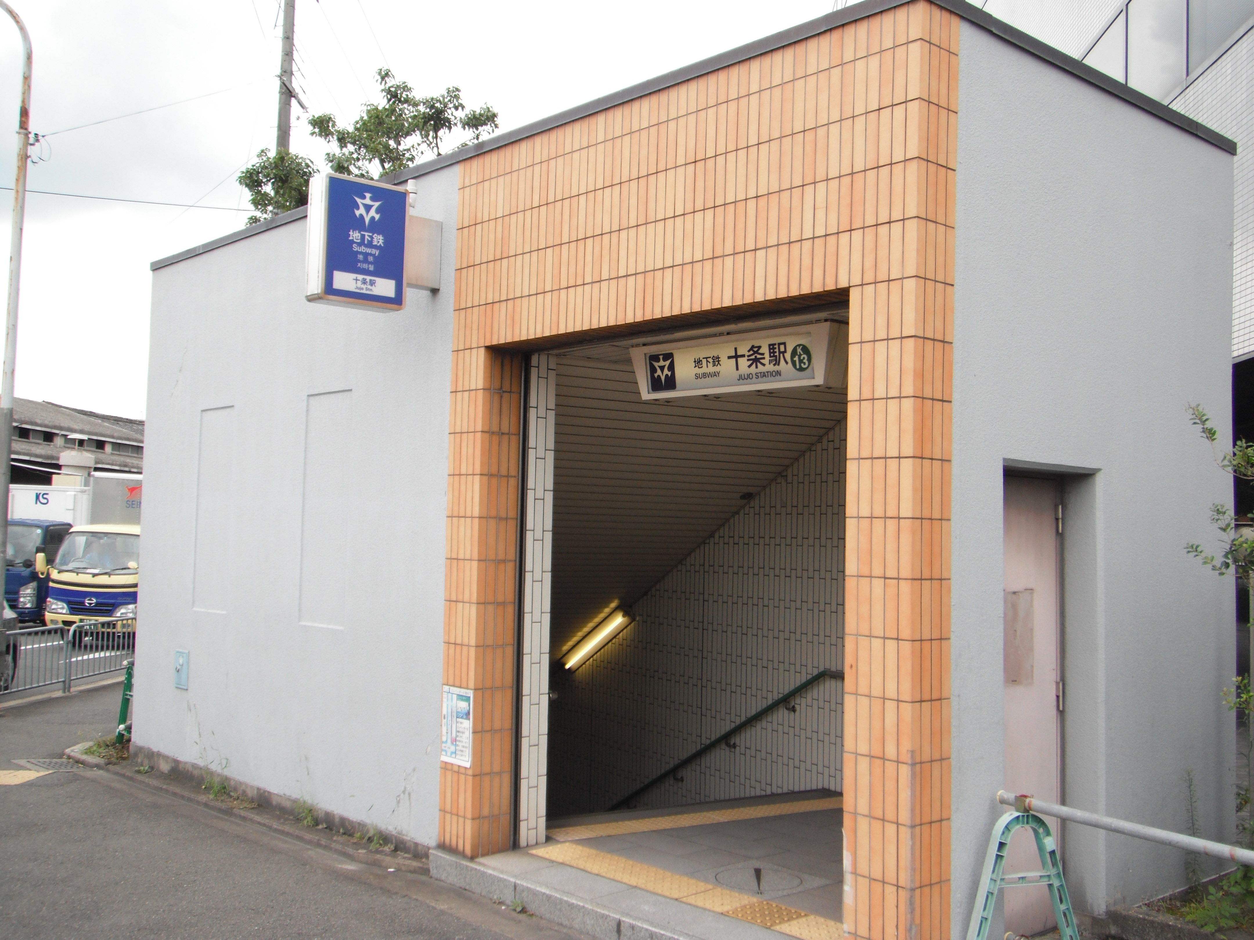 京都市営地下鉄烏丸線十条駅2番出入口（京都市南区）